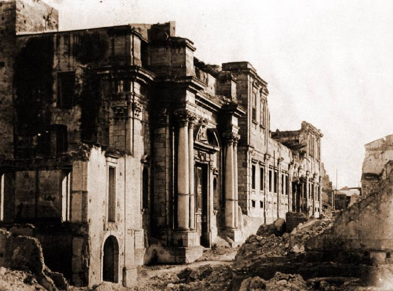 Church Messina Chiesa di San Giovanni Battista dei Gesuiti